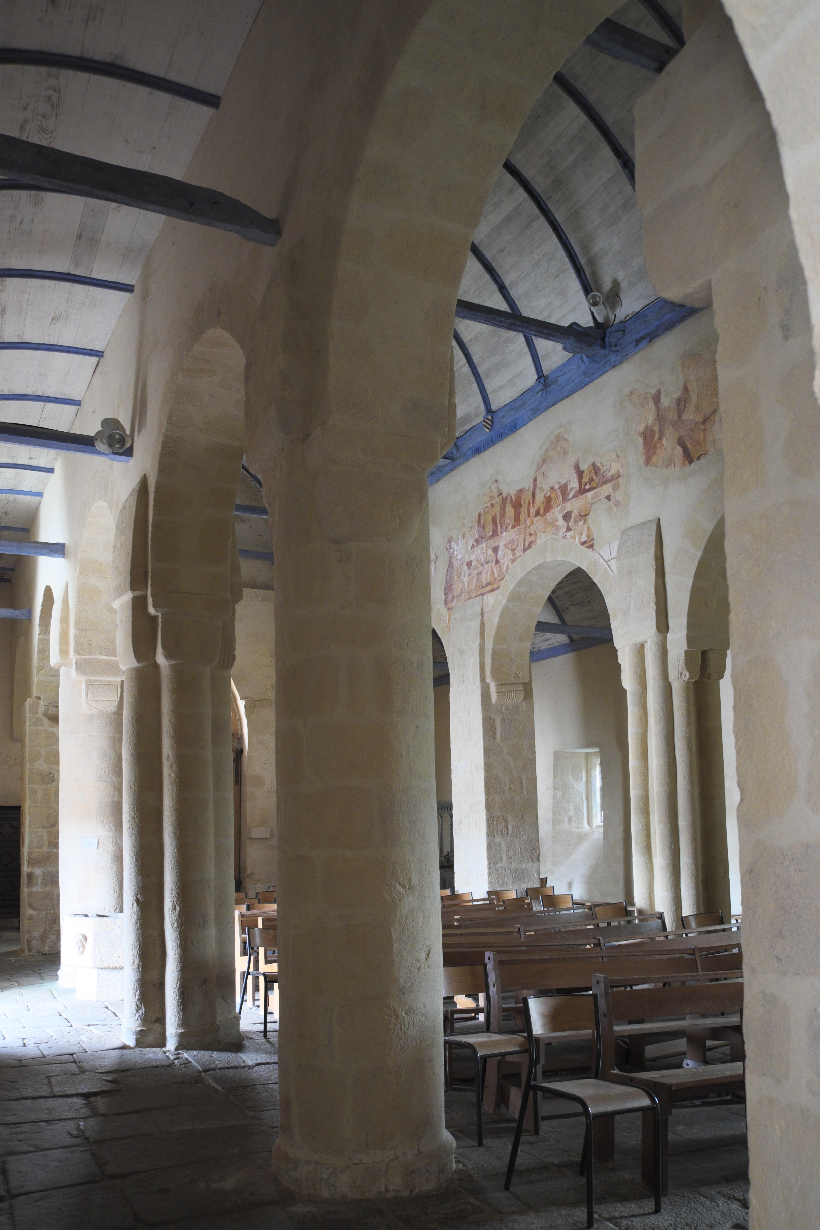 Katholische Pfarrkirche Ste-Trinité in Calan im Département Morbihan (Region Bretagne/Frankreich), Innenraum